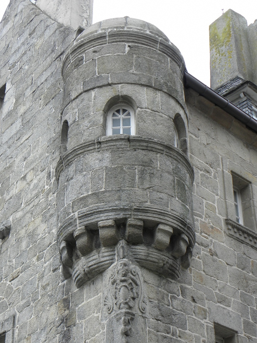 Tourelle d'angle de la maison prébendale sise 12 Rue Général Leclerc à Saint-Pol-de-Léon (29).